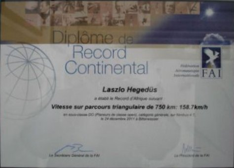 Hegedűs László diplomája. Új európai alaprekordot és országos rekordot repült 100 km-es háromszögpályán 156,66 km/órás átlagsebességgel.